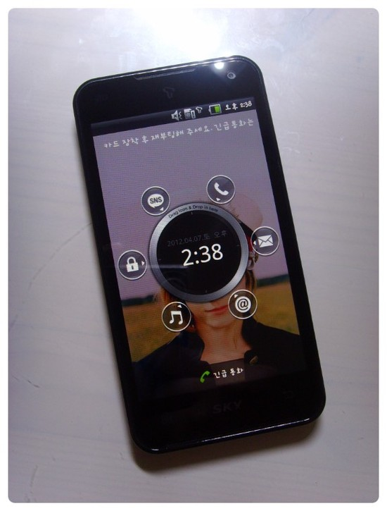 위 사진은 Pantech Vega Racer 로서 사진을찍으신분이 위키미디어에 업로드를 원하시고 위키미디어에 파일이 공유되는것을 원하여 합의 후 올림